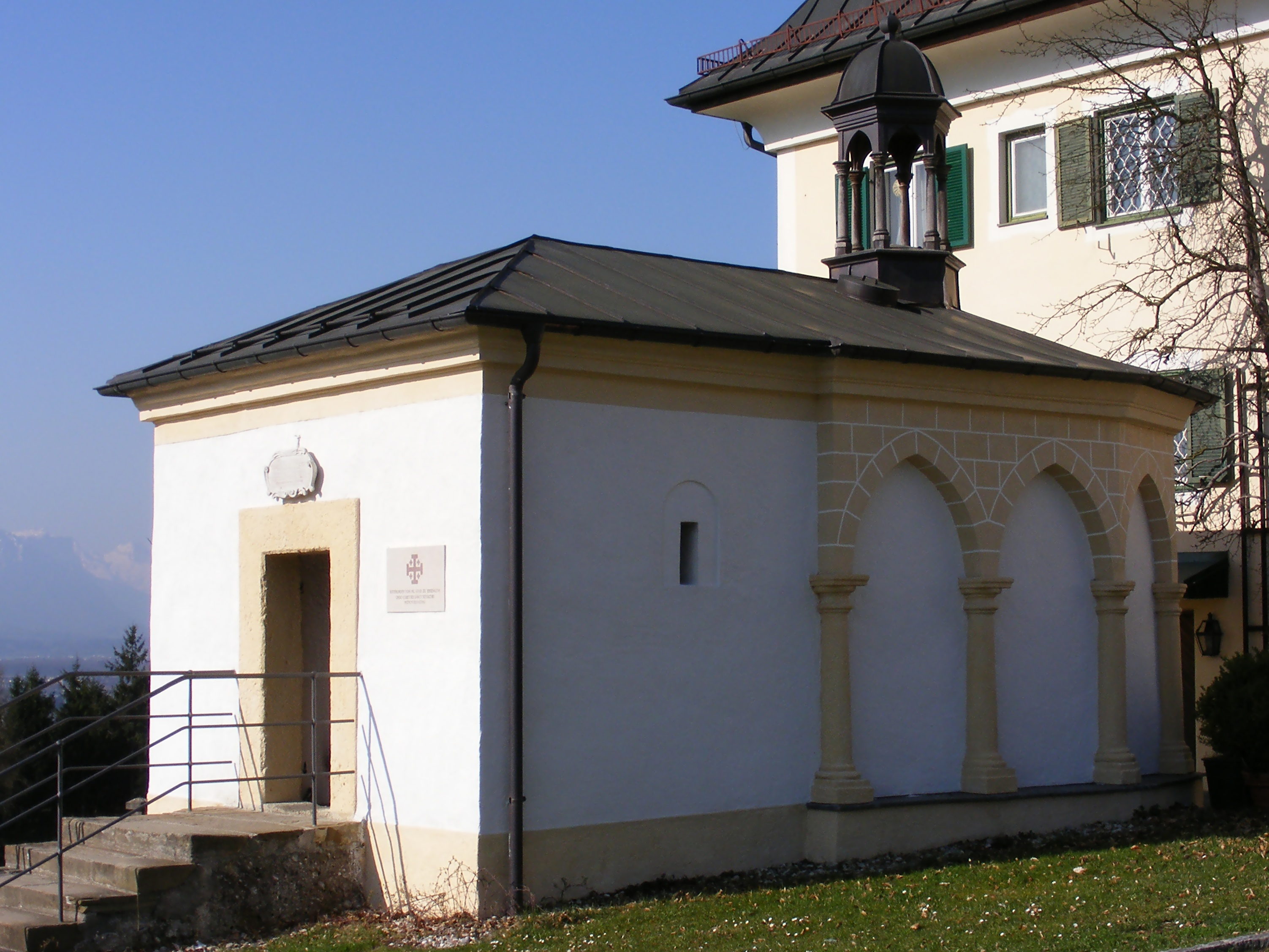 Die 1692 errichtete Grabkapelle in Maria Plain auf Plainberg im Land Salzburg.